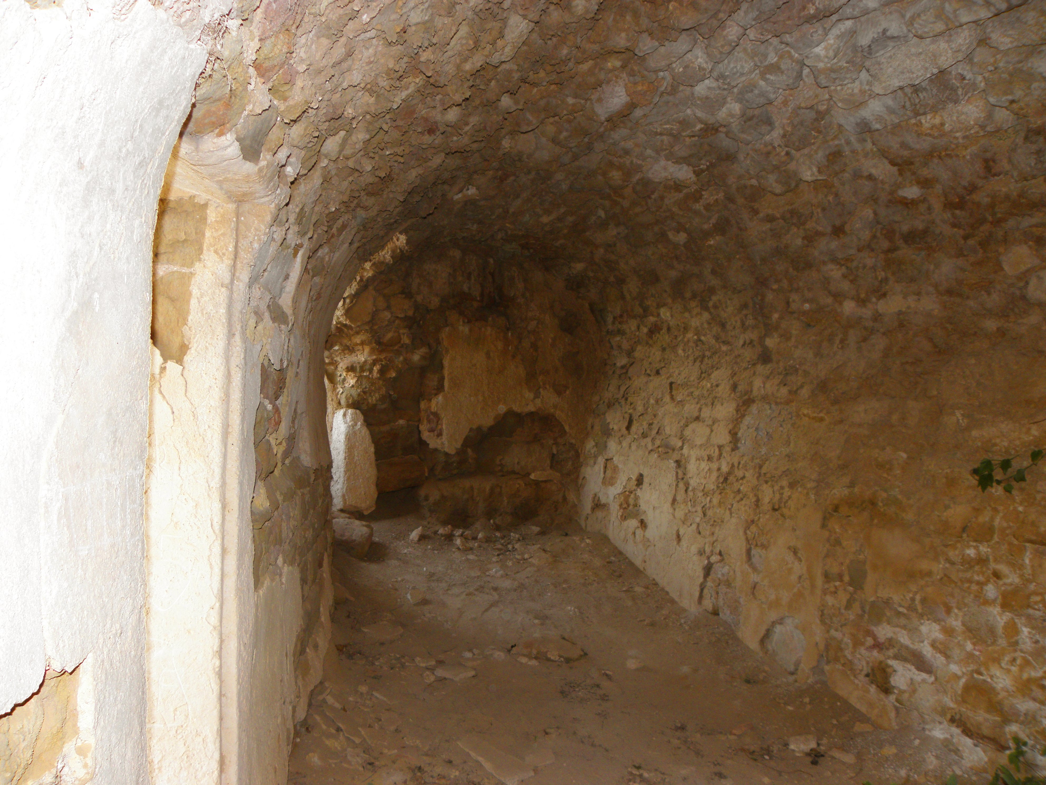 Església romànica de Sant Pere de Madrona (Pinell de Solsonès). Una de les estances de darrere el mur nord de la nau.